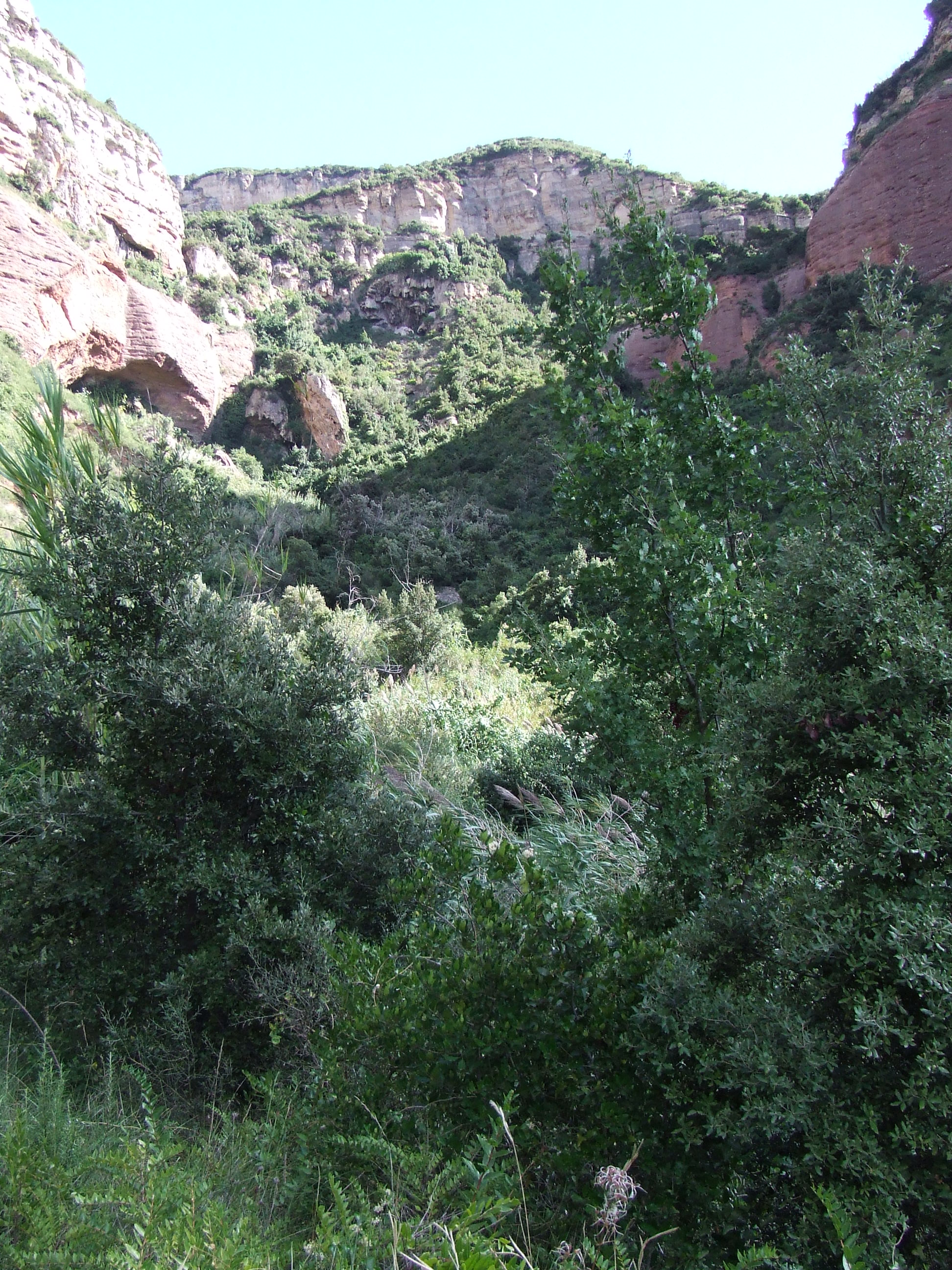 El torrent del Traver (Bertí i Riells del Fai, Bigues i Riells, Vallès Oriental, i Sant Quirze Safaja, Moianès)